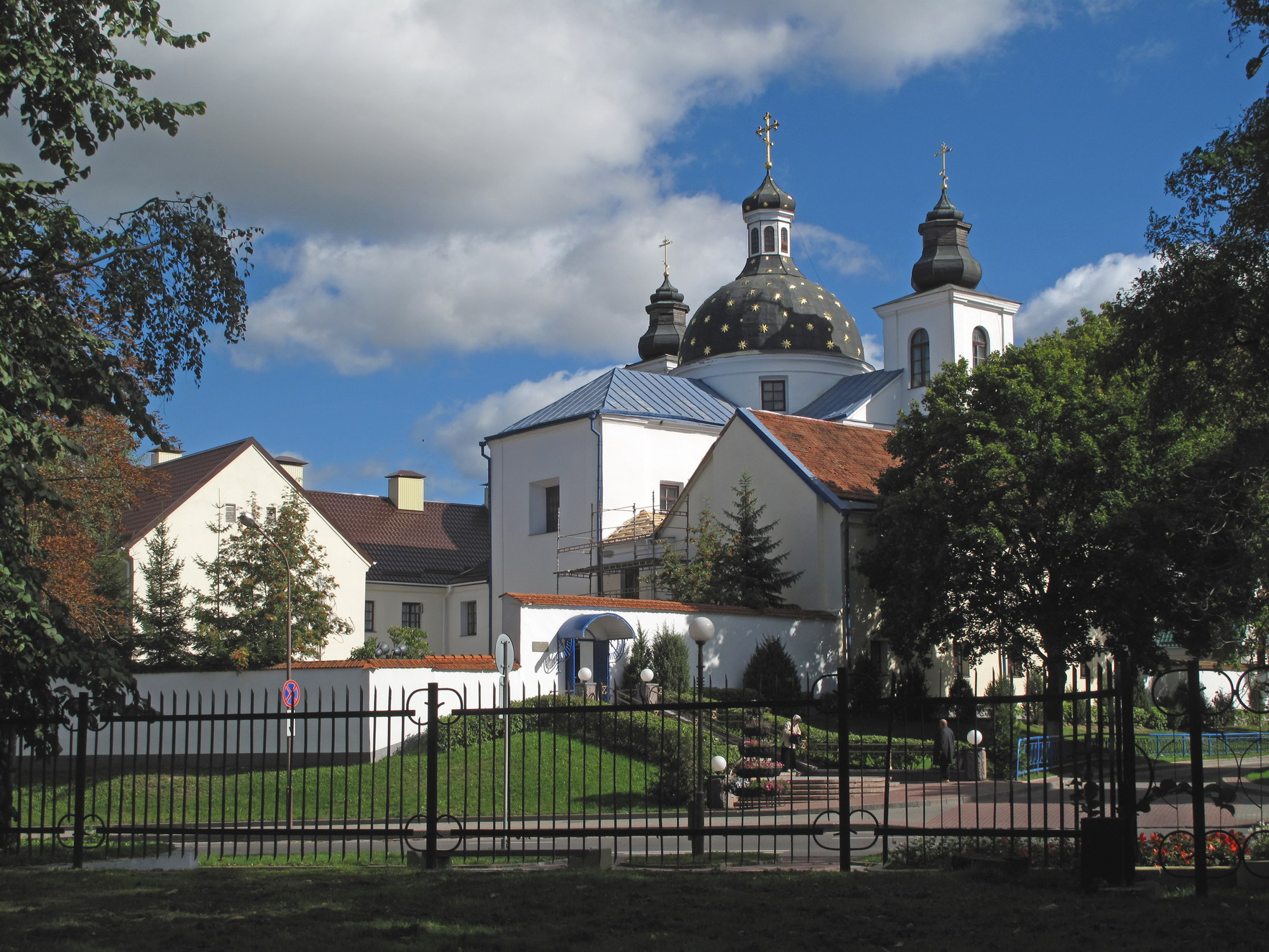 Беларуская (тарашкевіца): Современный вид